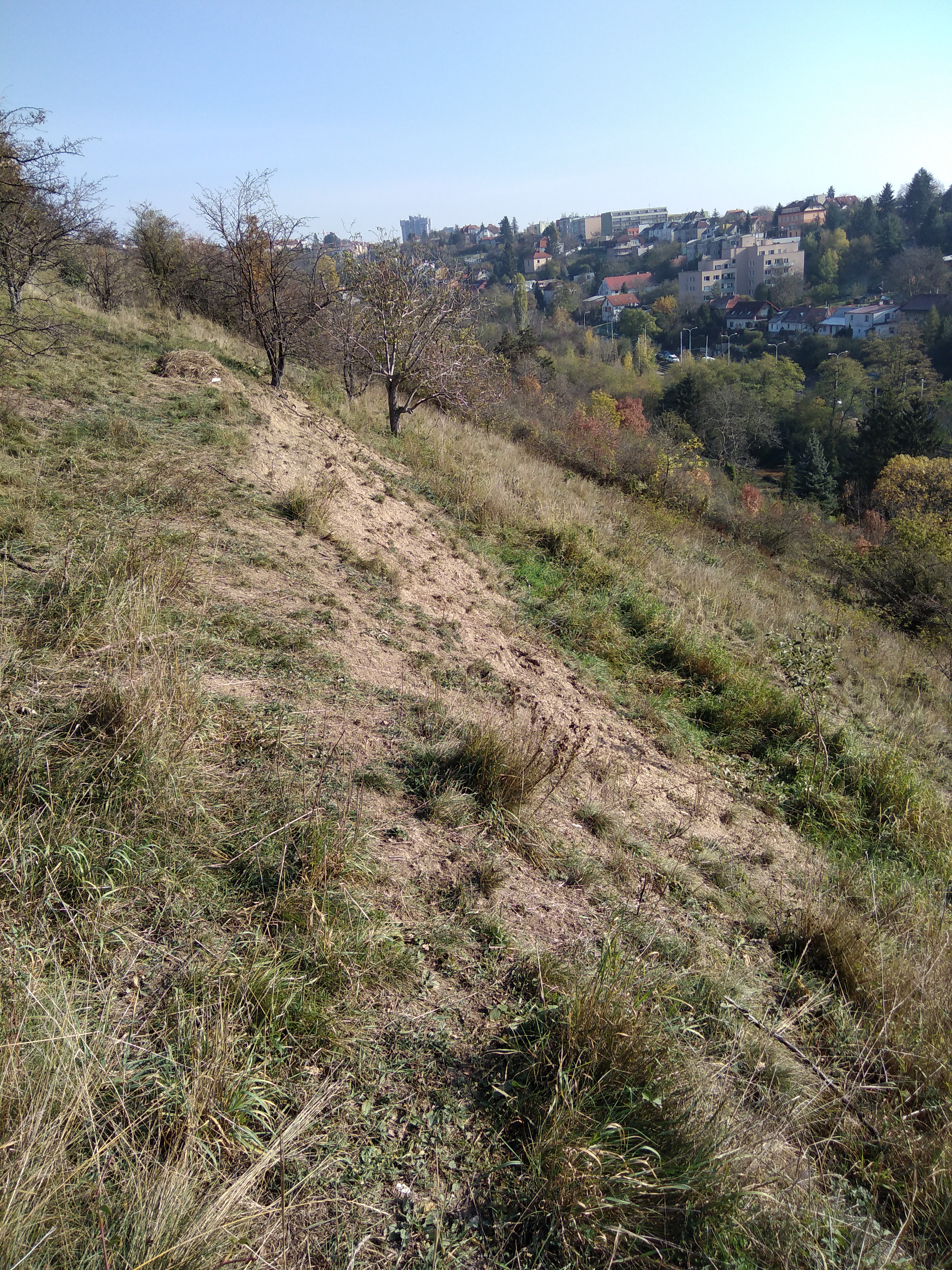 Pohled na stráň přírodní památky Trojská na Praze 8